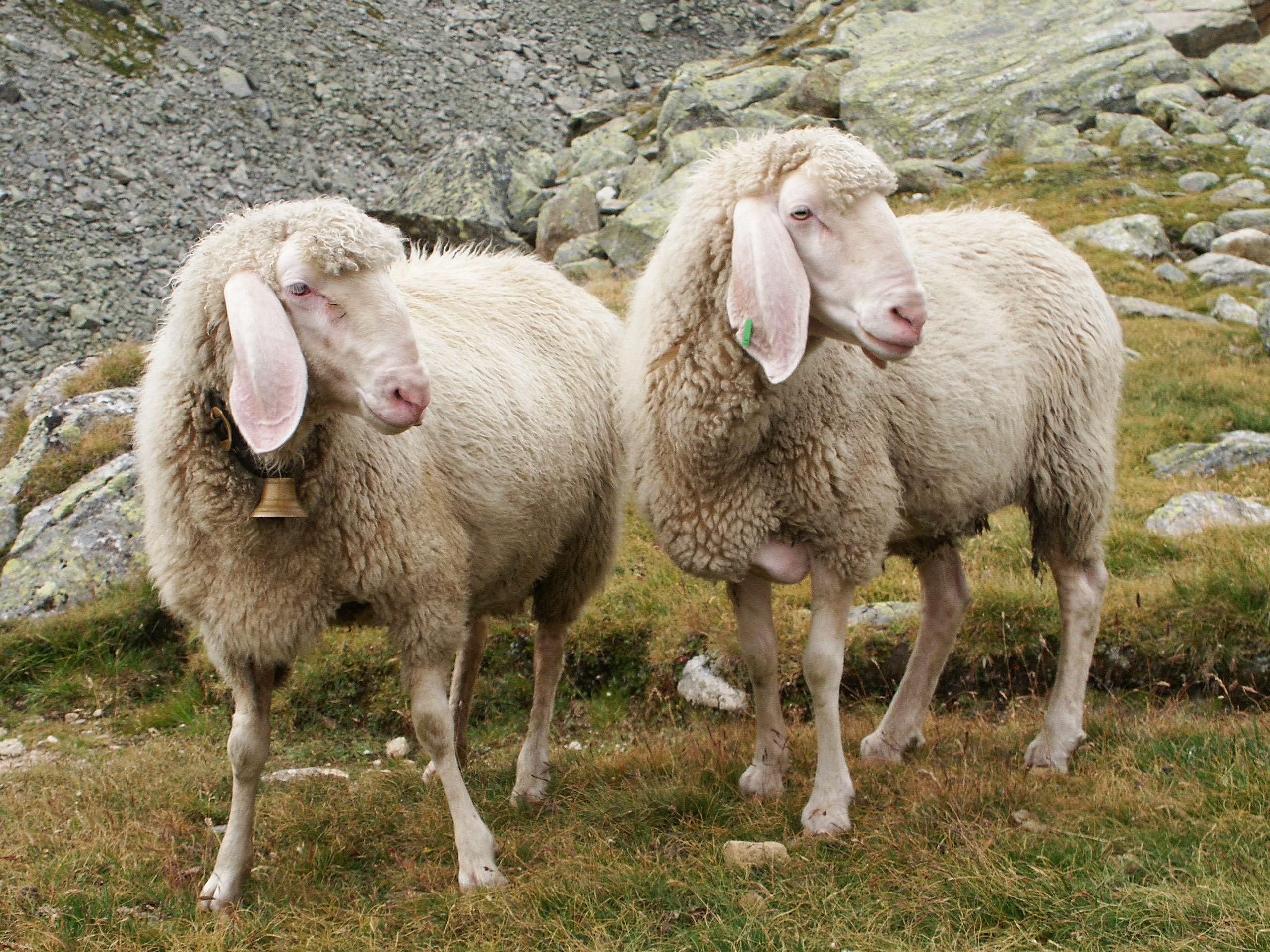 Zwei Schafe auf Bergweide in den Stubaier Alpen ("typische Pose", eines mit Glocke, eines mit Ohr-Marke)